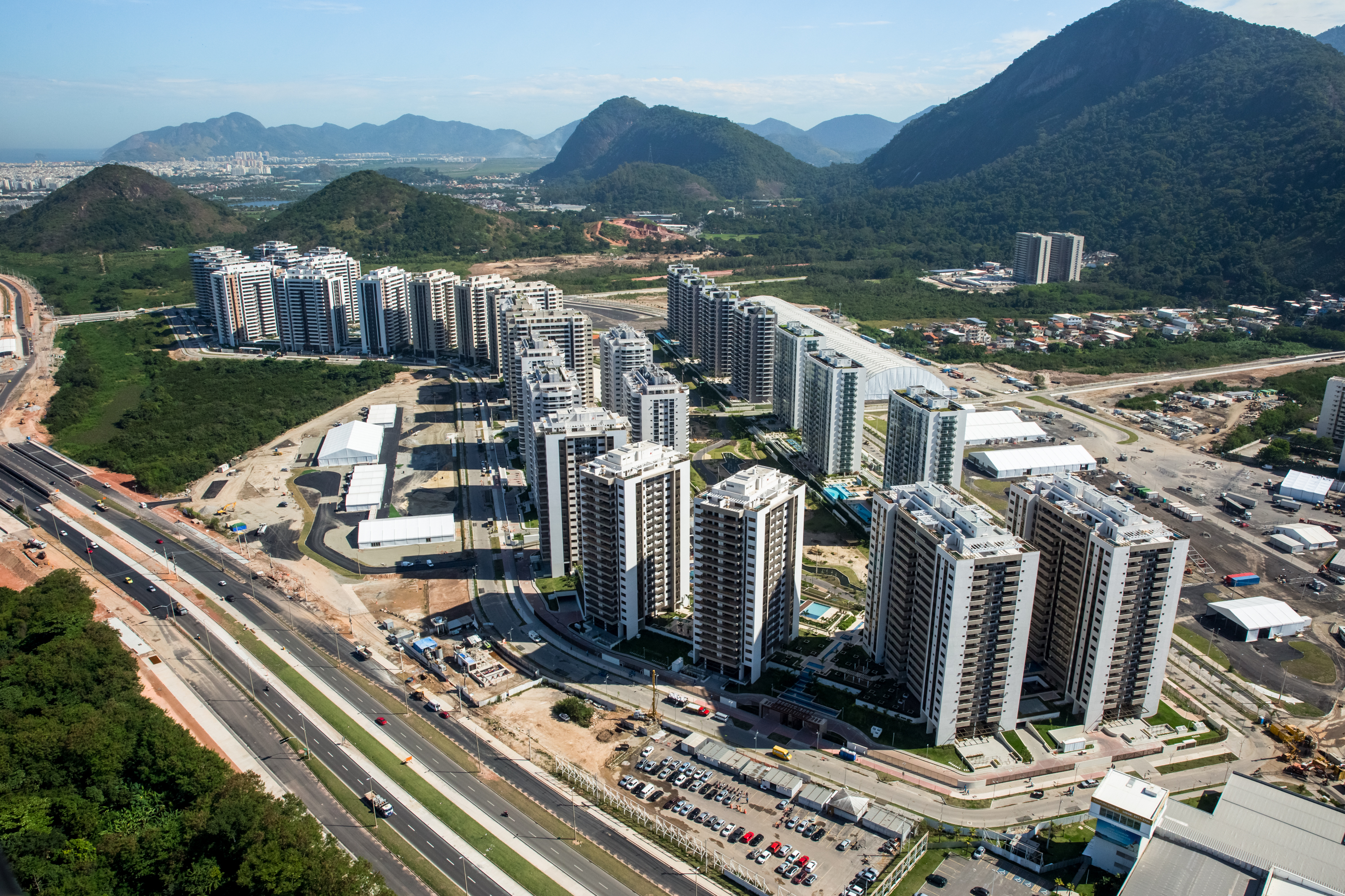 Olympic and Paralympic Village is delivered to Rio 2016